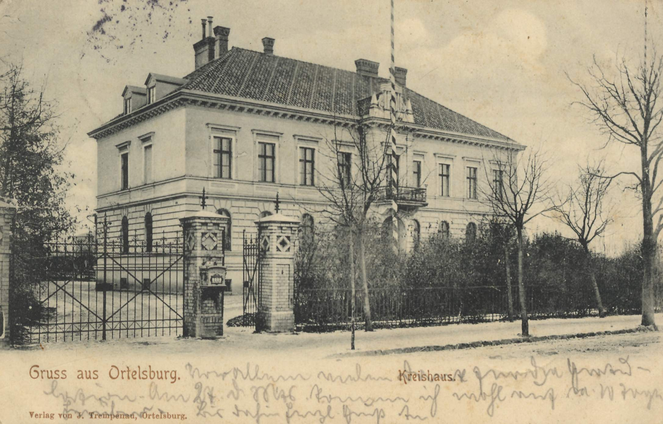 Kreishaus